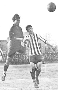 Rematando de cabeza con el Barça en el campo de la calle Indústria